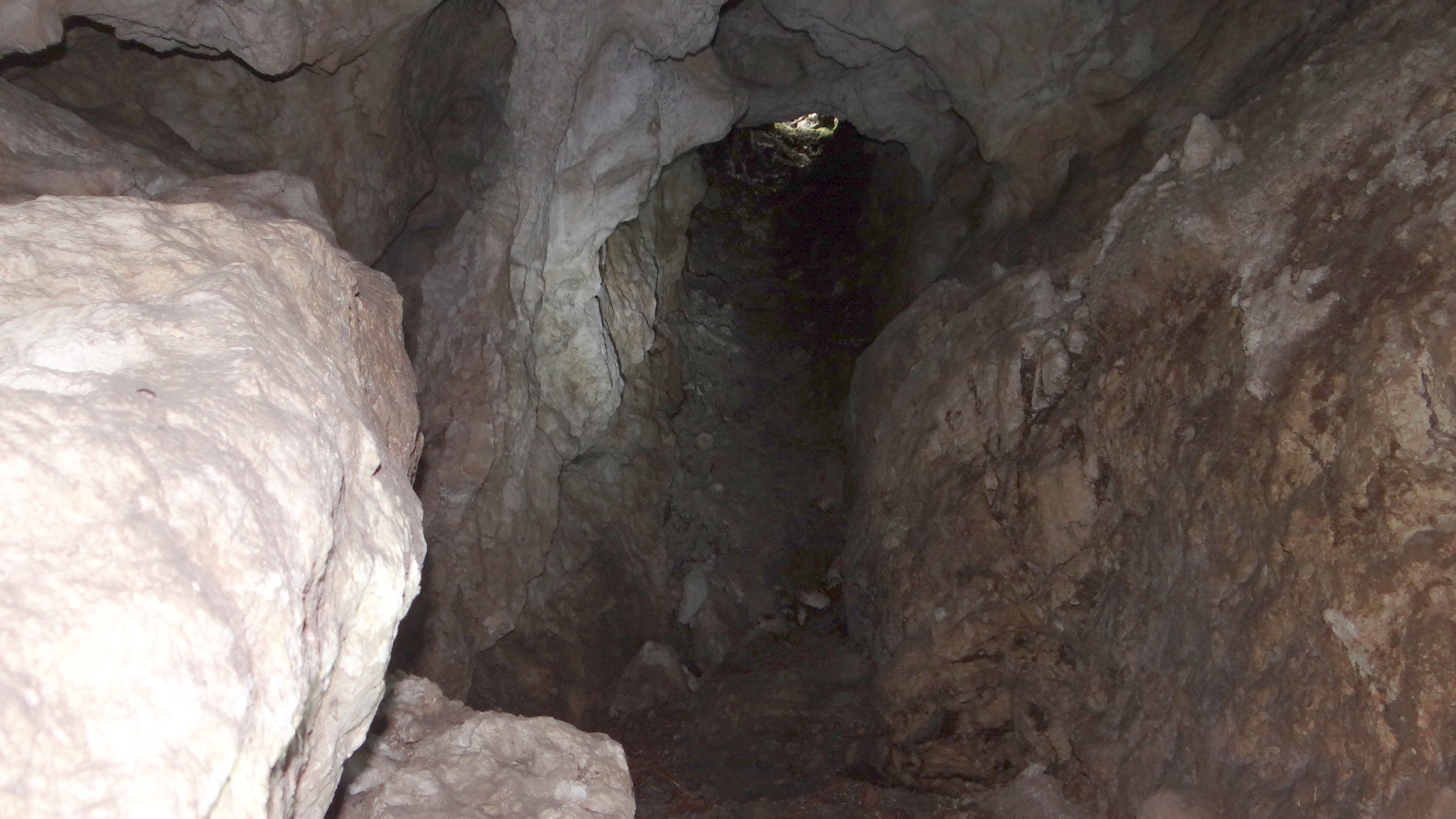 Jaskinia w Ostryszni w skale Cieplarnia w Wąwozie Ostryszni